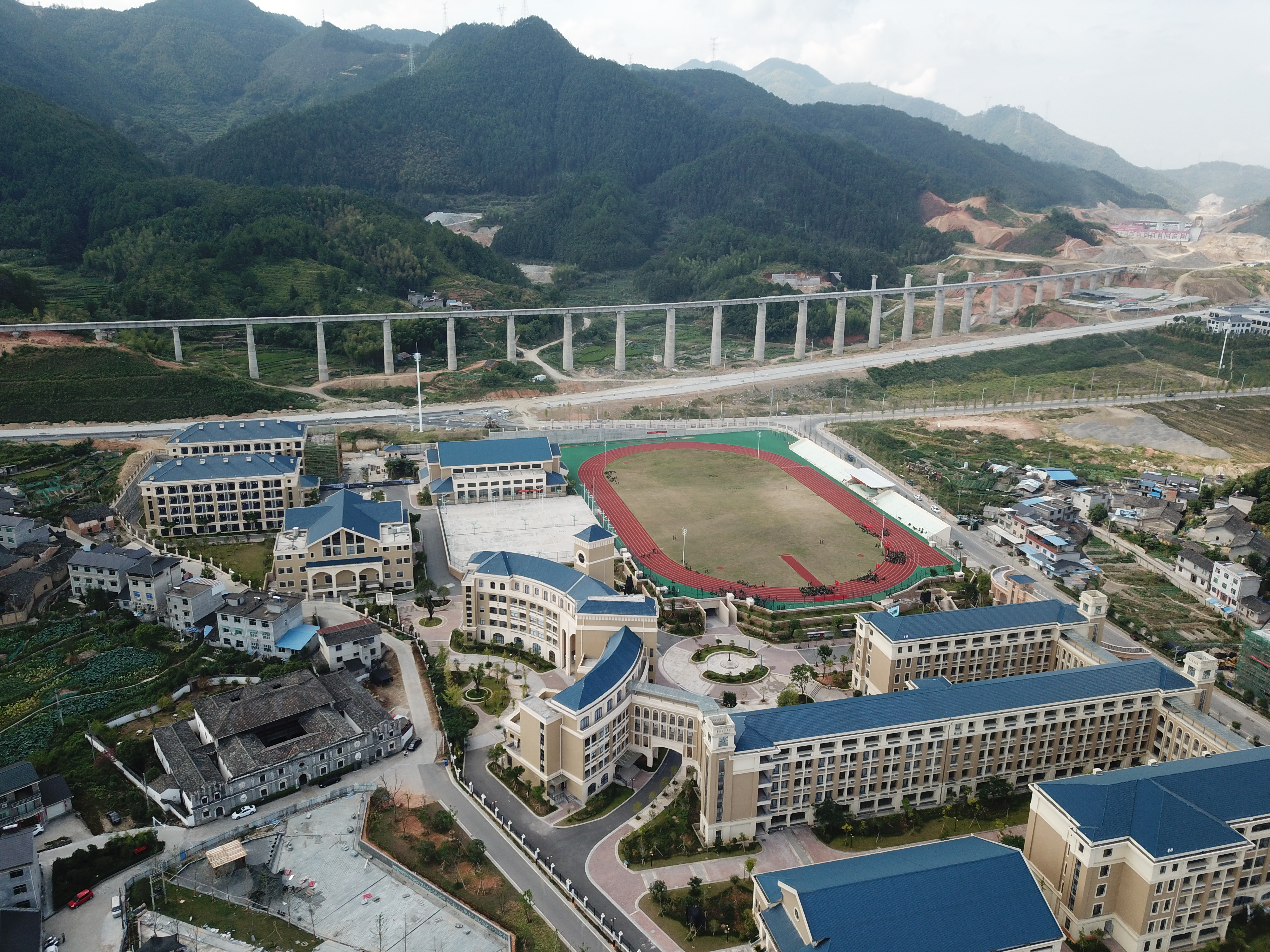 龙泉·浙江大学龙泉分校旧址 旁边为浙大中学，远处为衢宁铁路